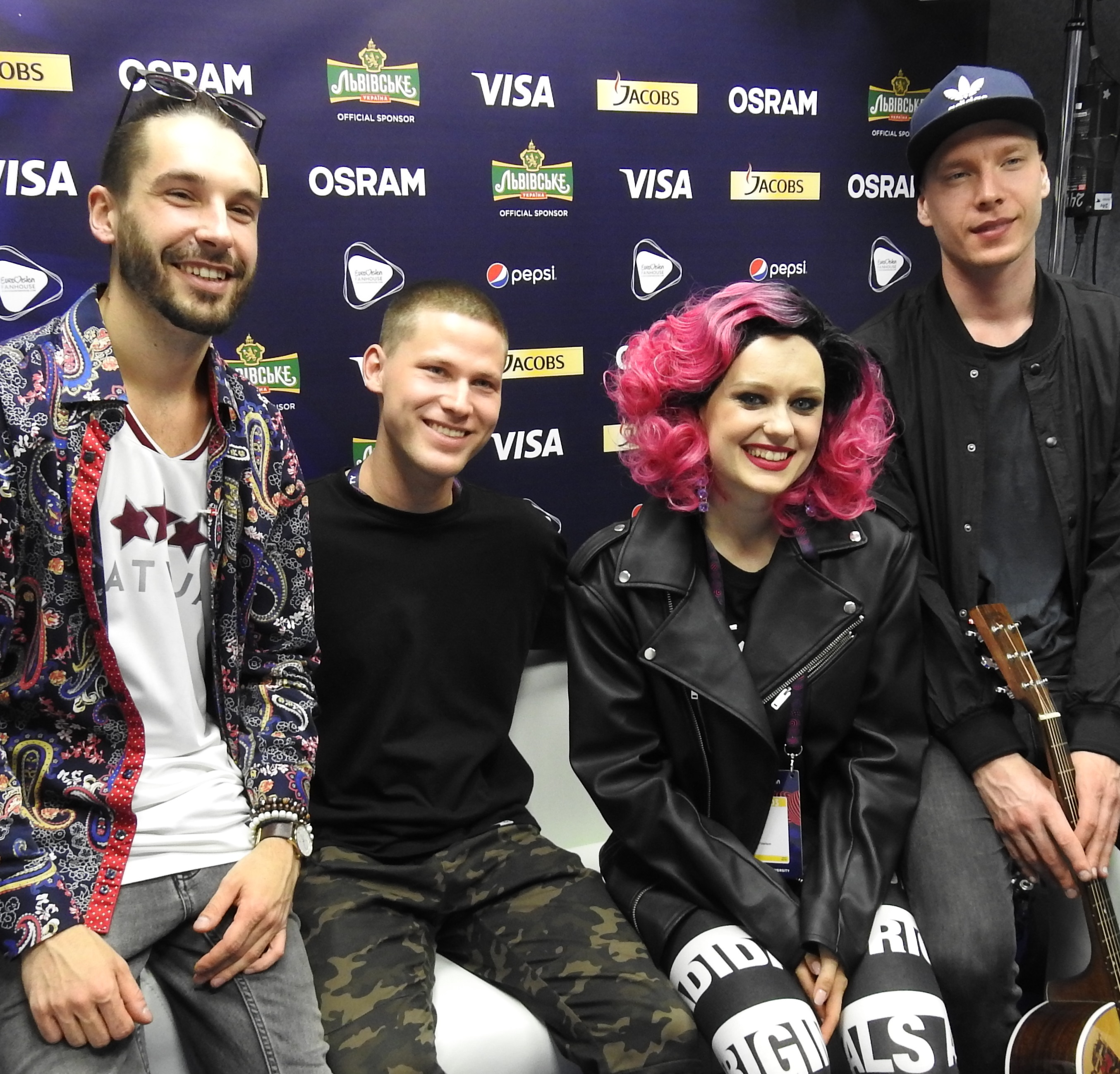 Łotewski zespół muzyczny Triana Park w maju 2017 roku.